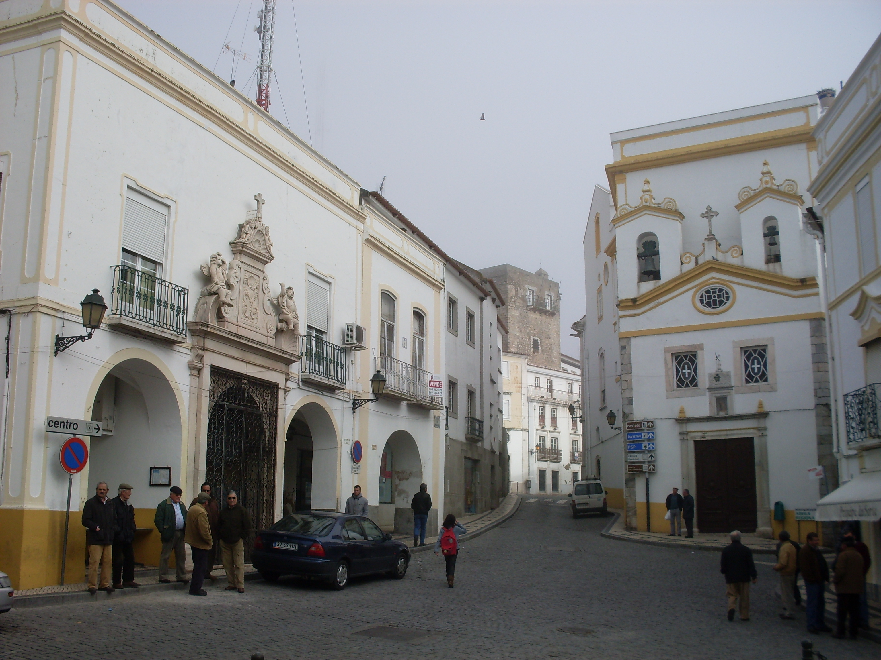 Elvas - Largo da Misericórdia. À direita, um passo da via sacra. Em frente, a Igreja da misericórdia. Ao fundo, a torre da cadeia.